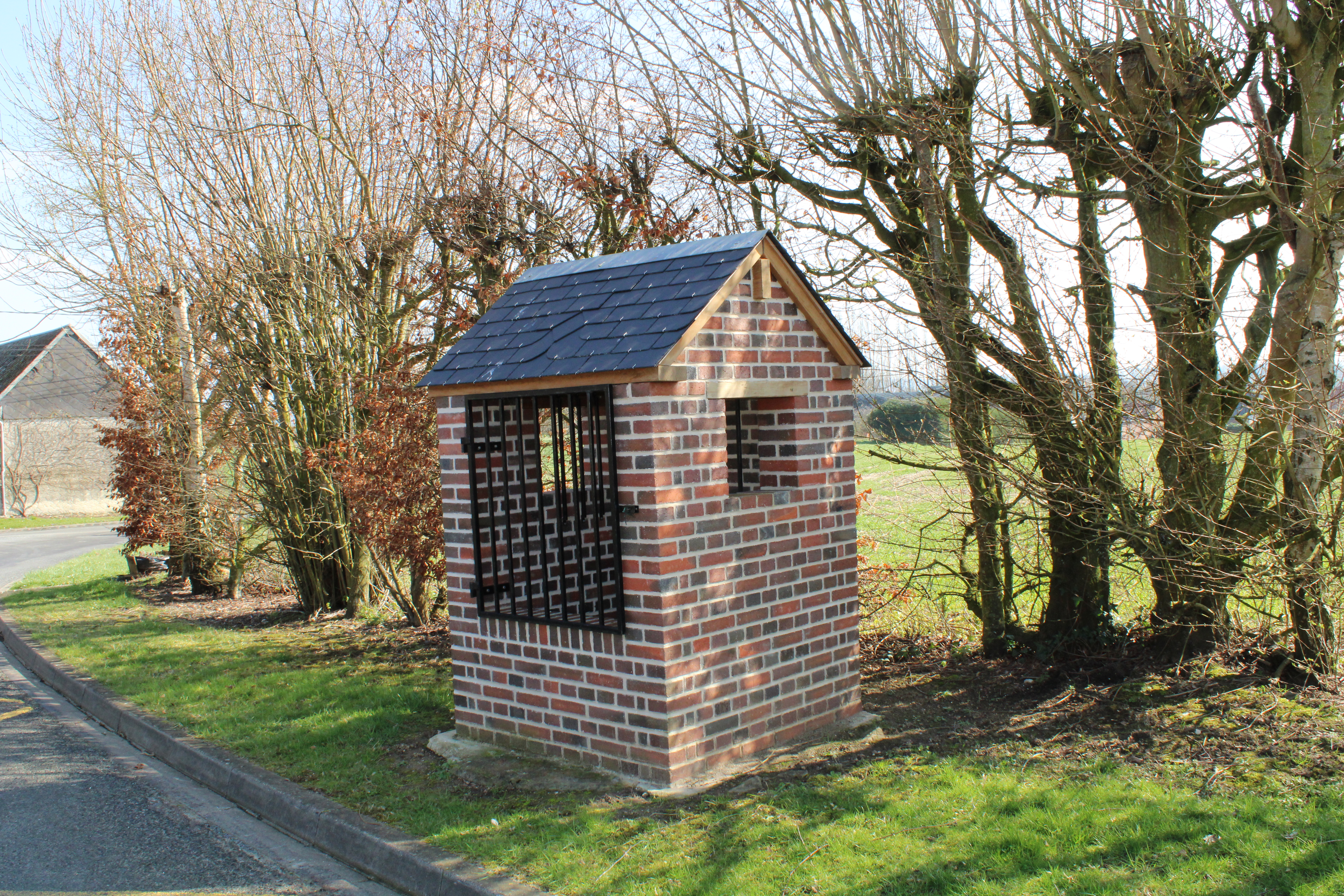 Ancien puits public rénové.